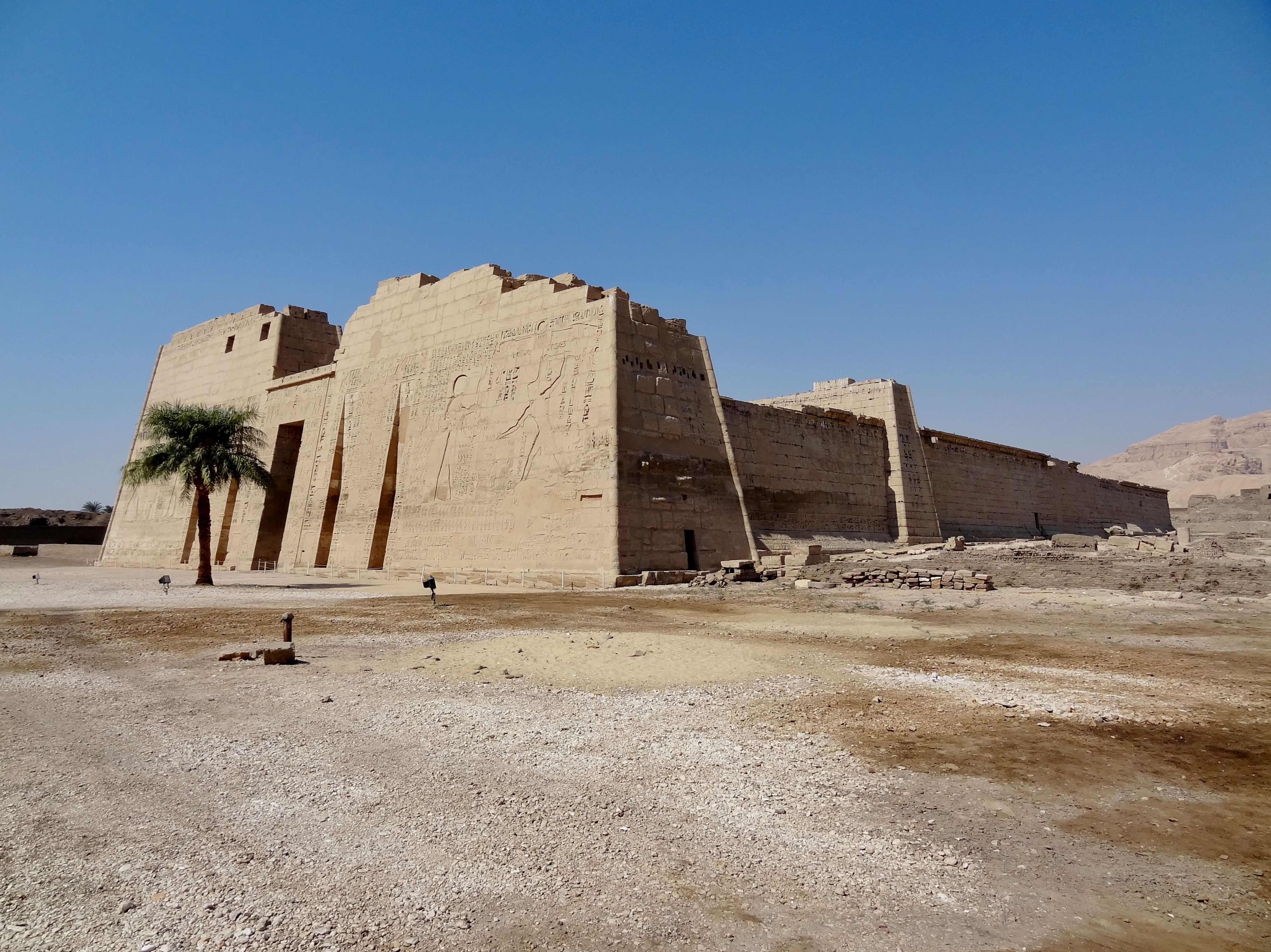 Totentempel Ramses’ III. in Medinet Habu, Ägypten